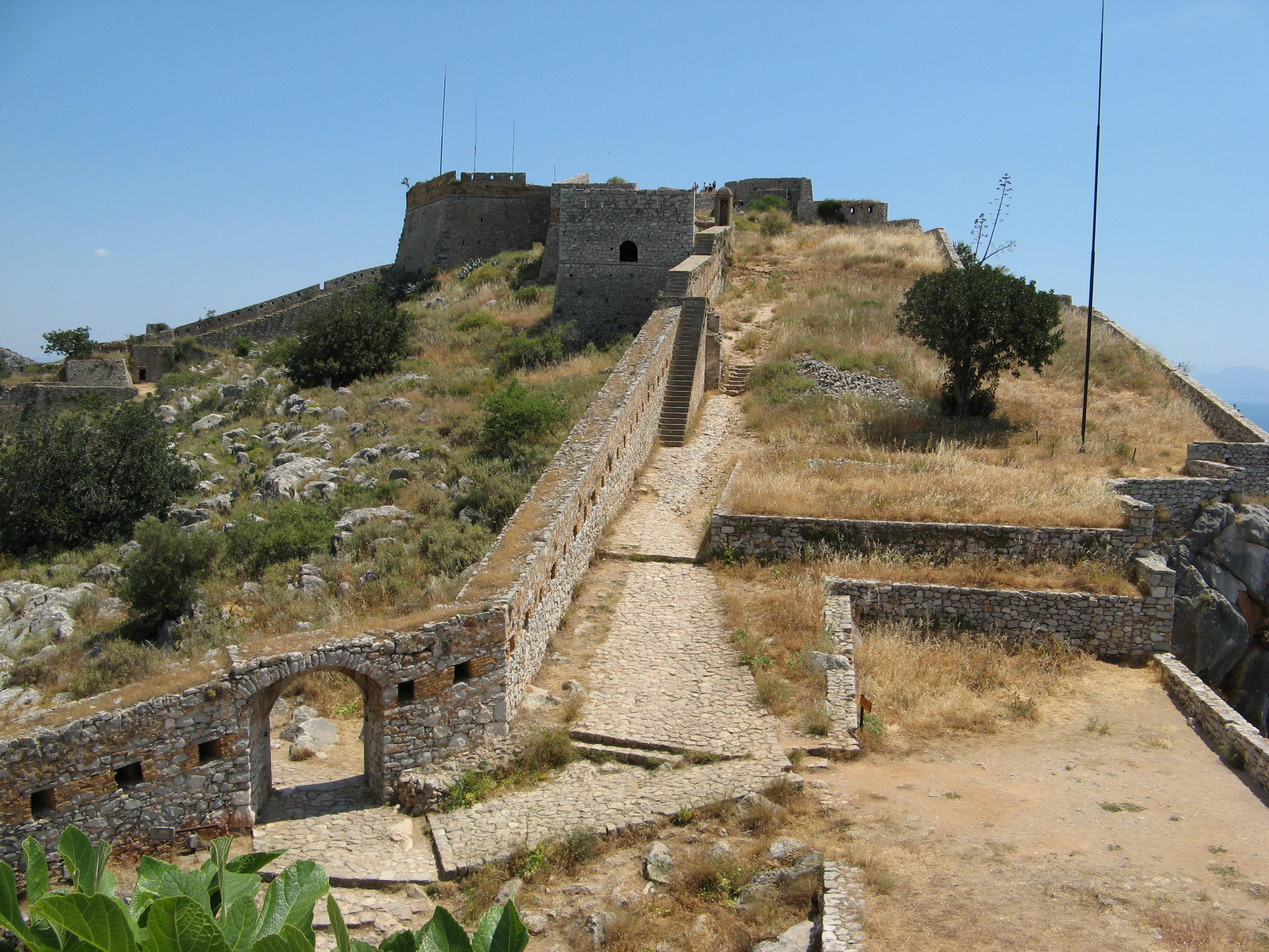 Palamidi Fortress in Nafplio